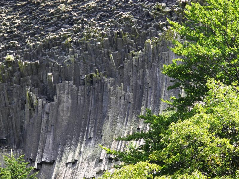 Detunata Goala